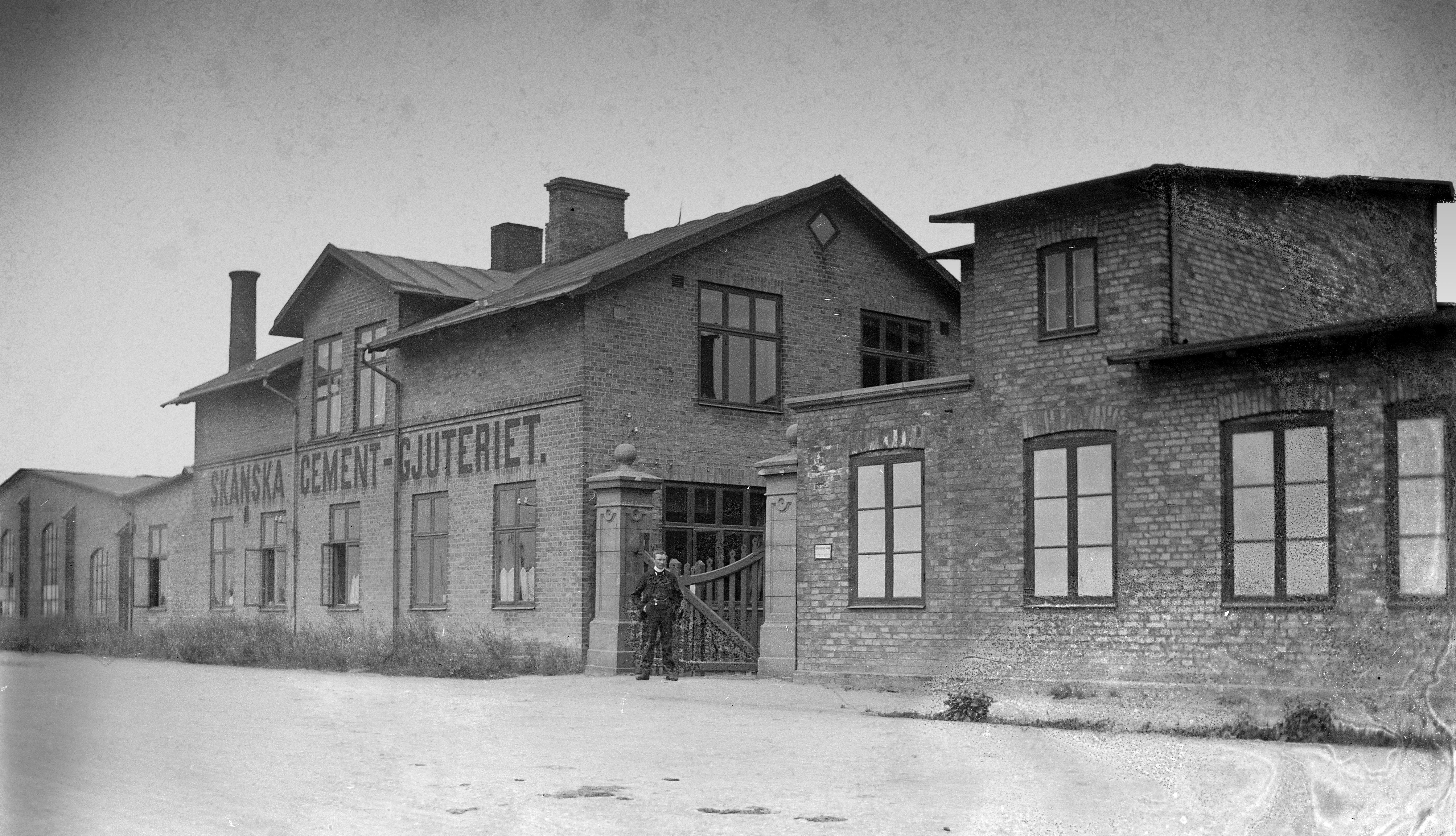 Skånska Cementgjuteriet Augusti 1903 i Malmö.